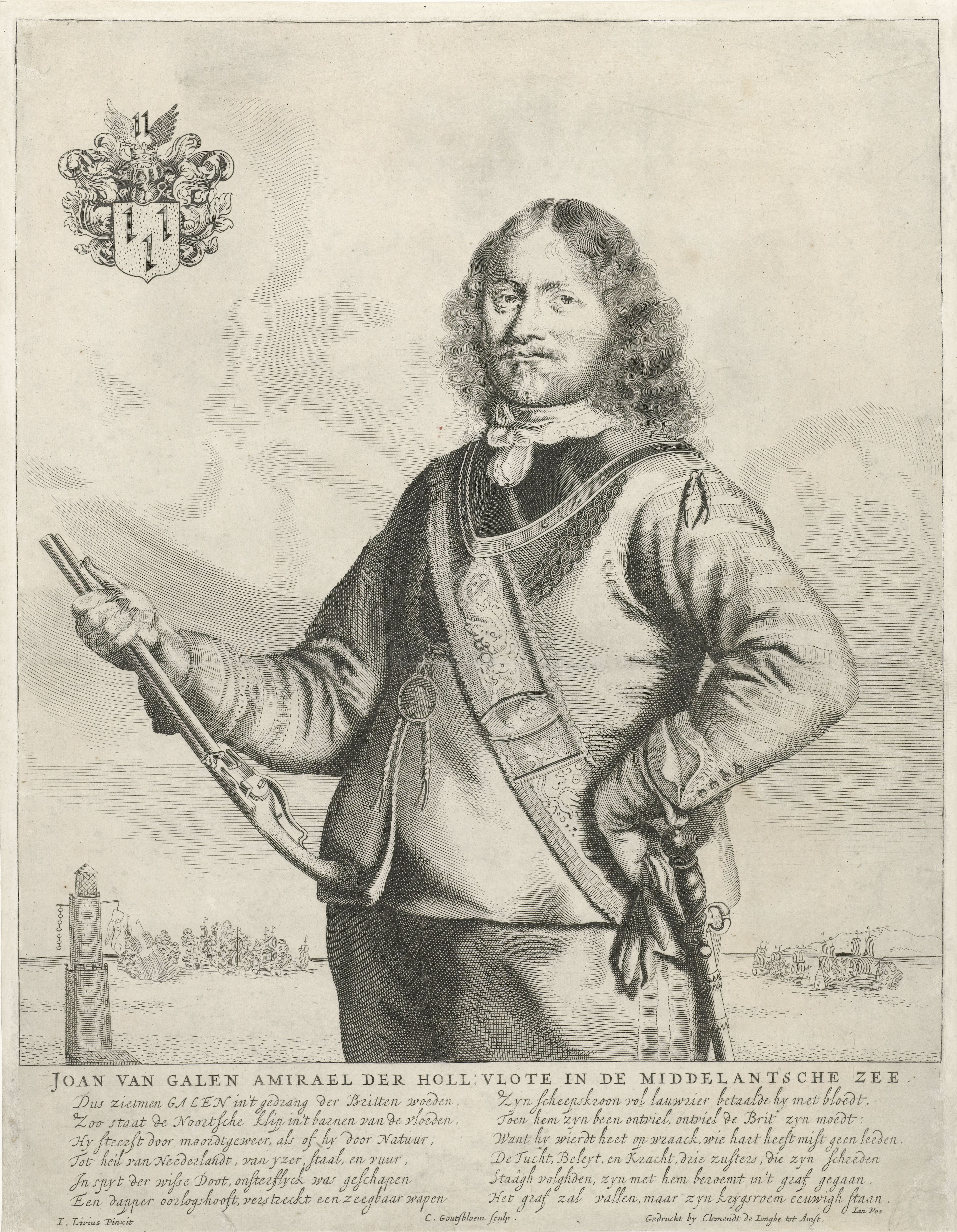 Nedersaksies: Jan (of Johan) van Galen (Essen, 1604/1605 - Livorno, 23 maart 1653) was een Nederlands vlootvoogd.Dus ziet men G A L E N in 't gedrang der Britten woeden. Zoo staat een Noordse Klip, in 't barnen van de vloeden. Hy strееft door moordgeweer, als of hy door natuur Tot heyl van Nederland, van yser,staal, en vuur In Spijt der wisse Dood, onsterflijk was geschapen, Ееn Dapper Oorlogs-hooft, verstrekt een Zeegbaar Wapen, Zijn Scbeepskroon vol Laurier betaalden hy met bloed, Toen hem zijn been ontviel, ontviel de Brit zijn moed; Want hy wierd heet op wraak. Wie hart heeft, mist geen Leden, De tucht, beleid, en kracht, drie Zusters, die zijn schreden, Staag volgden, zijn met hem beroemt in 't Graf gegaan; Het Graf zal vallen, maar zijn Krijgsroem eeuwig staan.